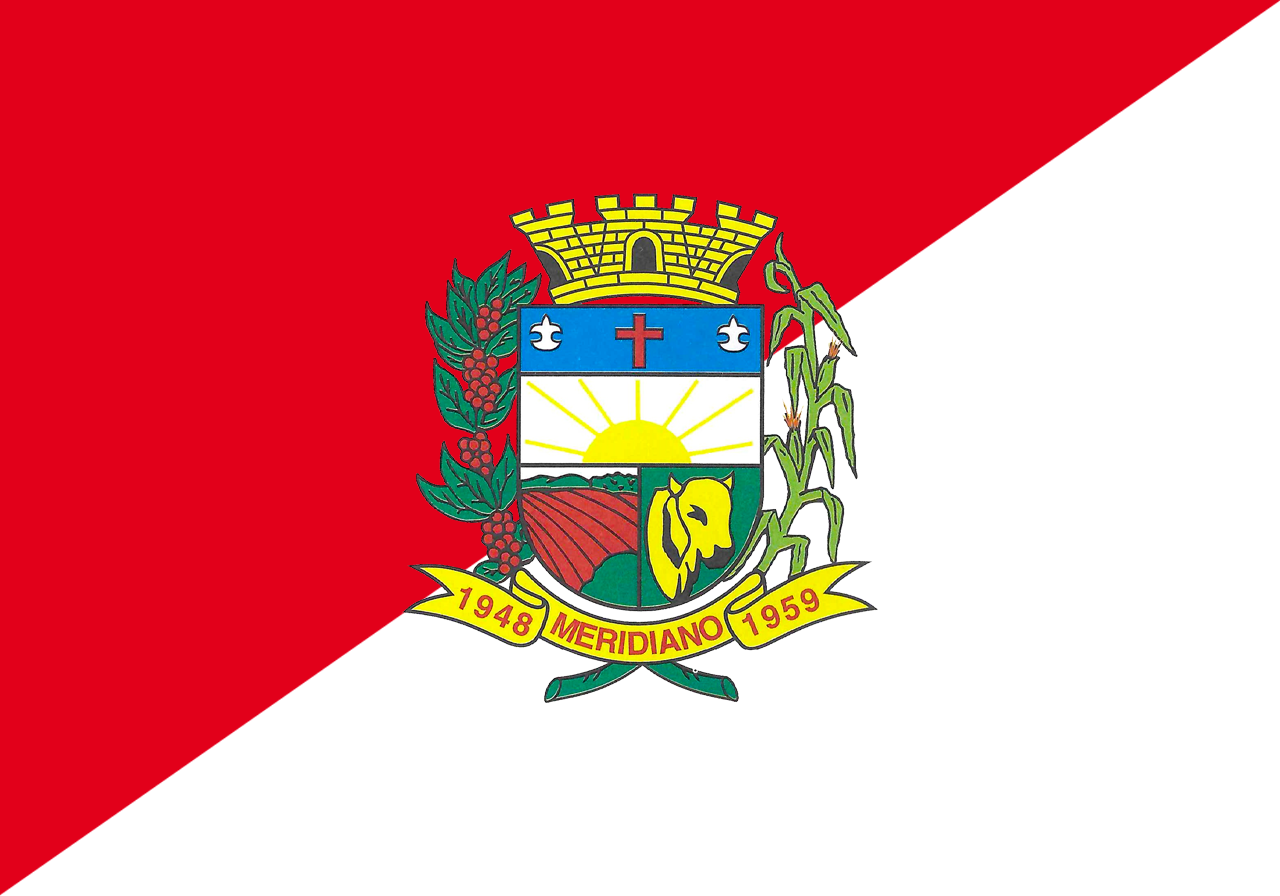 Bandeira do Município de Meridiano,São Paulo,Brasil